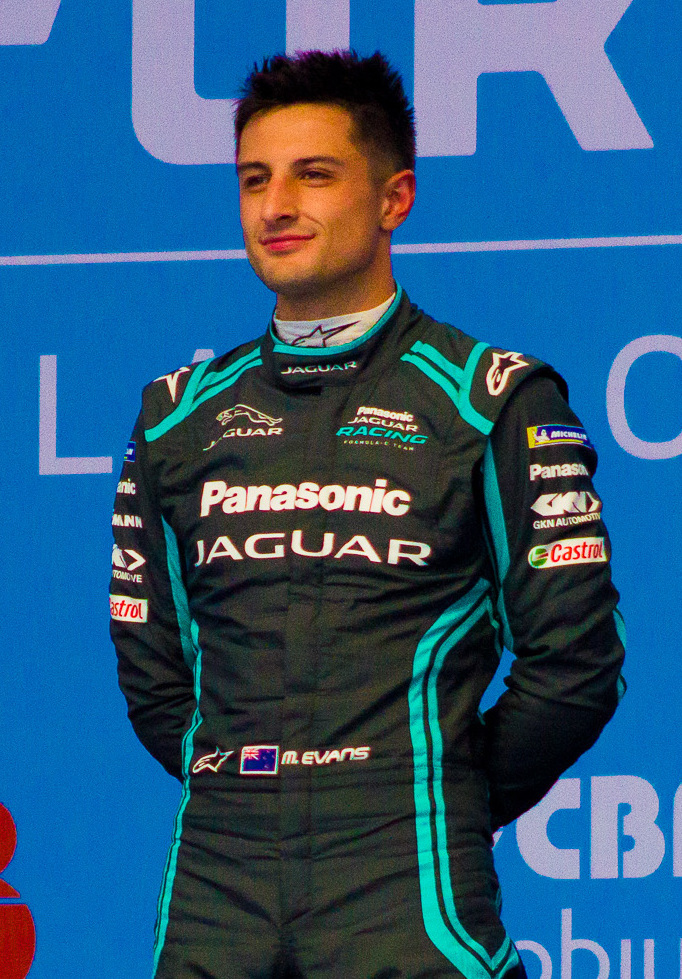 2019-20 FIA Formula E, CBMM Niobium Mexico City E-Prix 2020, Autódromo Hermanos Rodríguez, Ciudad de México, 15 de febrero 2020